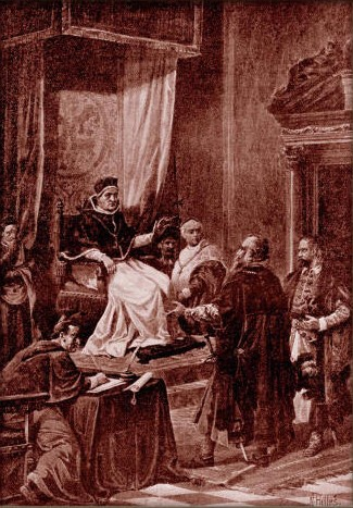 Ferdinand Hetteš - České poselství před papežem